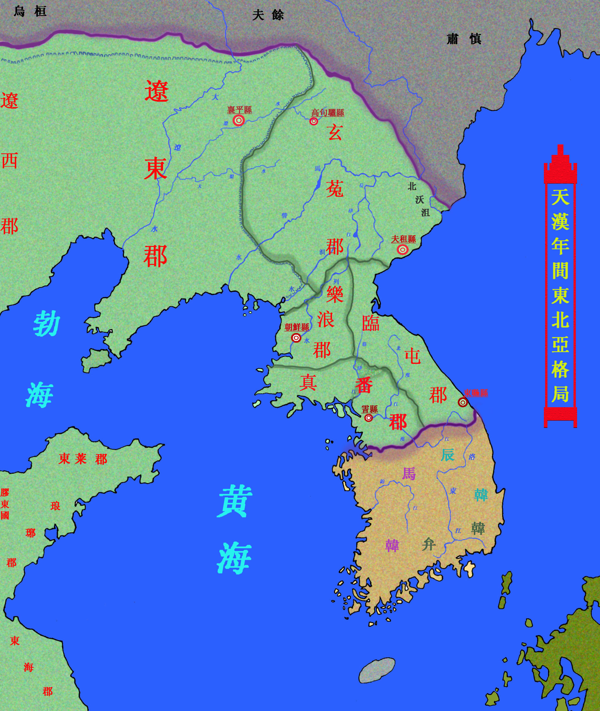 中文（中国大陆）: 中国东北与朝鲜半岛 命名1 copy.jpg